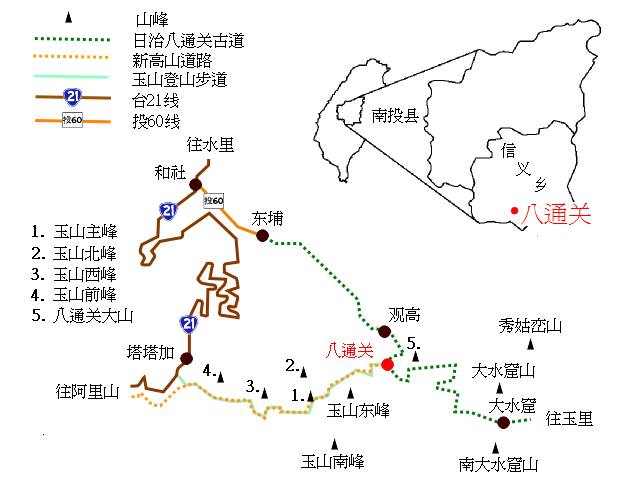 八通关位置图